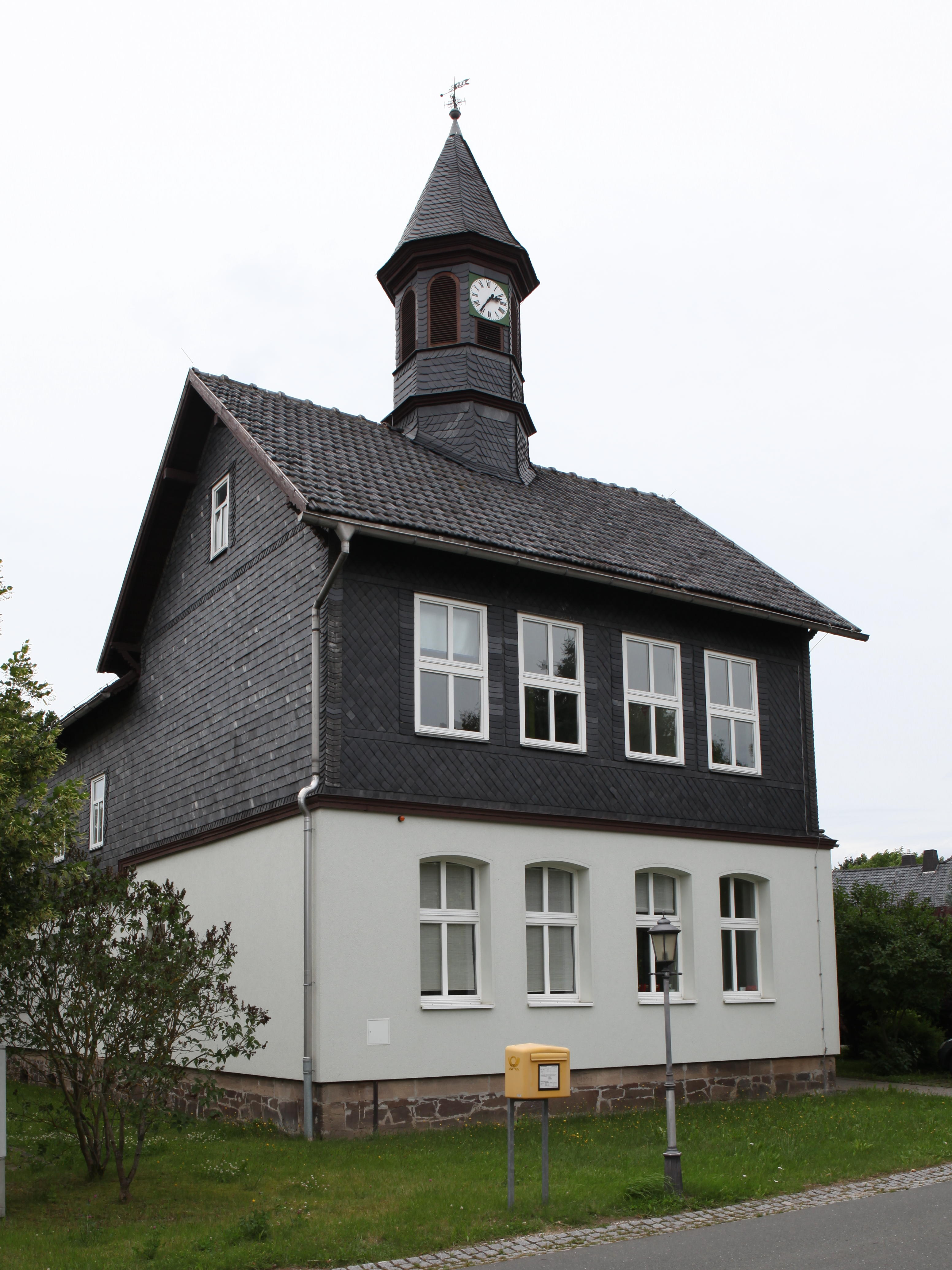 Ehem. Schule in Hönbach, OT von Sonneberg, Thüringen